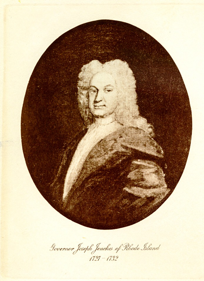 Ritratto di Joseph Jenckes, governatore del Rhode Island